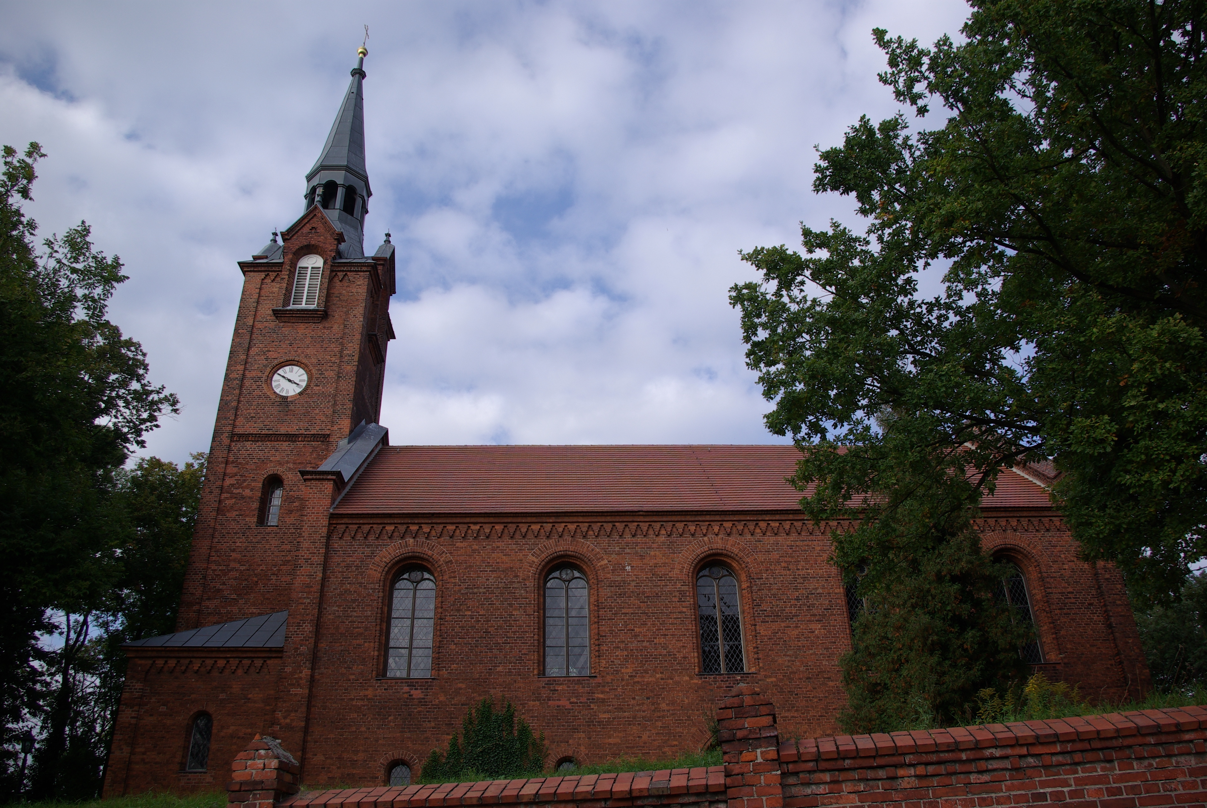 Neißemünde Ortsteil Wellmitz in Brandenburg. Die Kirche im Ortsteil Wellmitz steht unter Denkmalschutz. Die Kirche wurde 1854 erbaut.